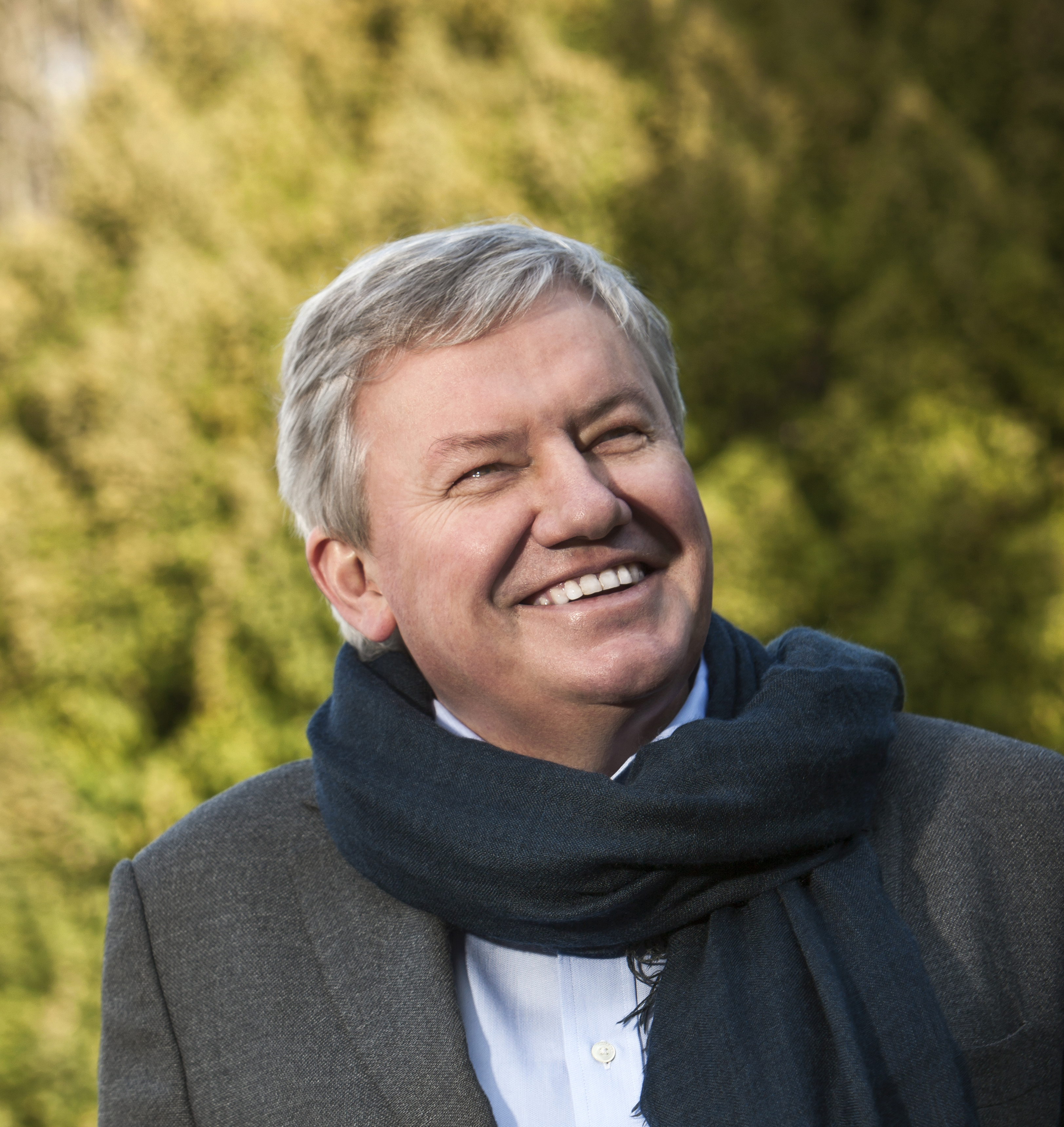 Portrait du ministre belge Jean-Claude Marcourt